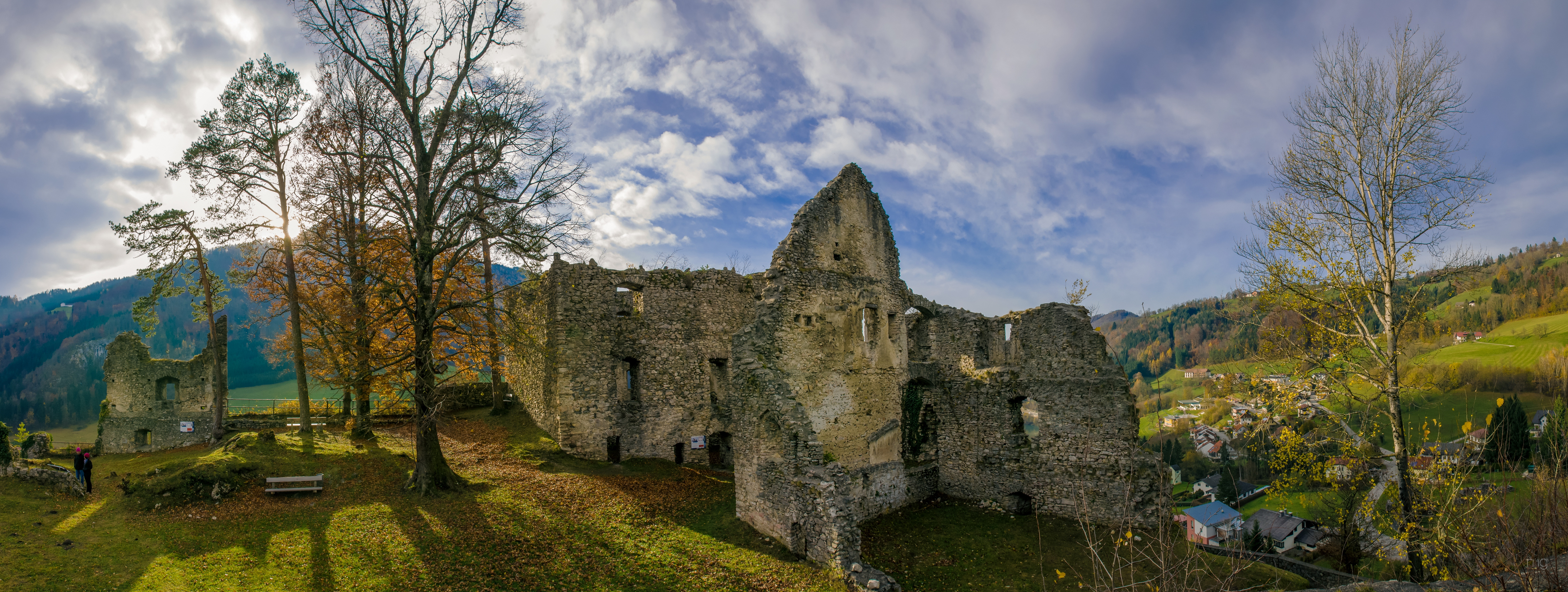 Innenansicht der Burgruine Losenstein.